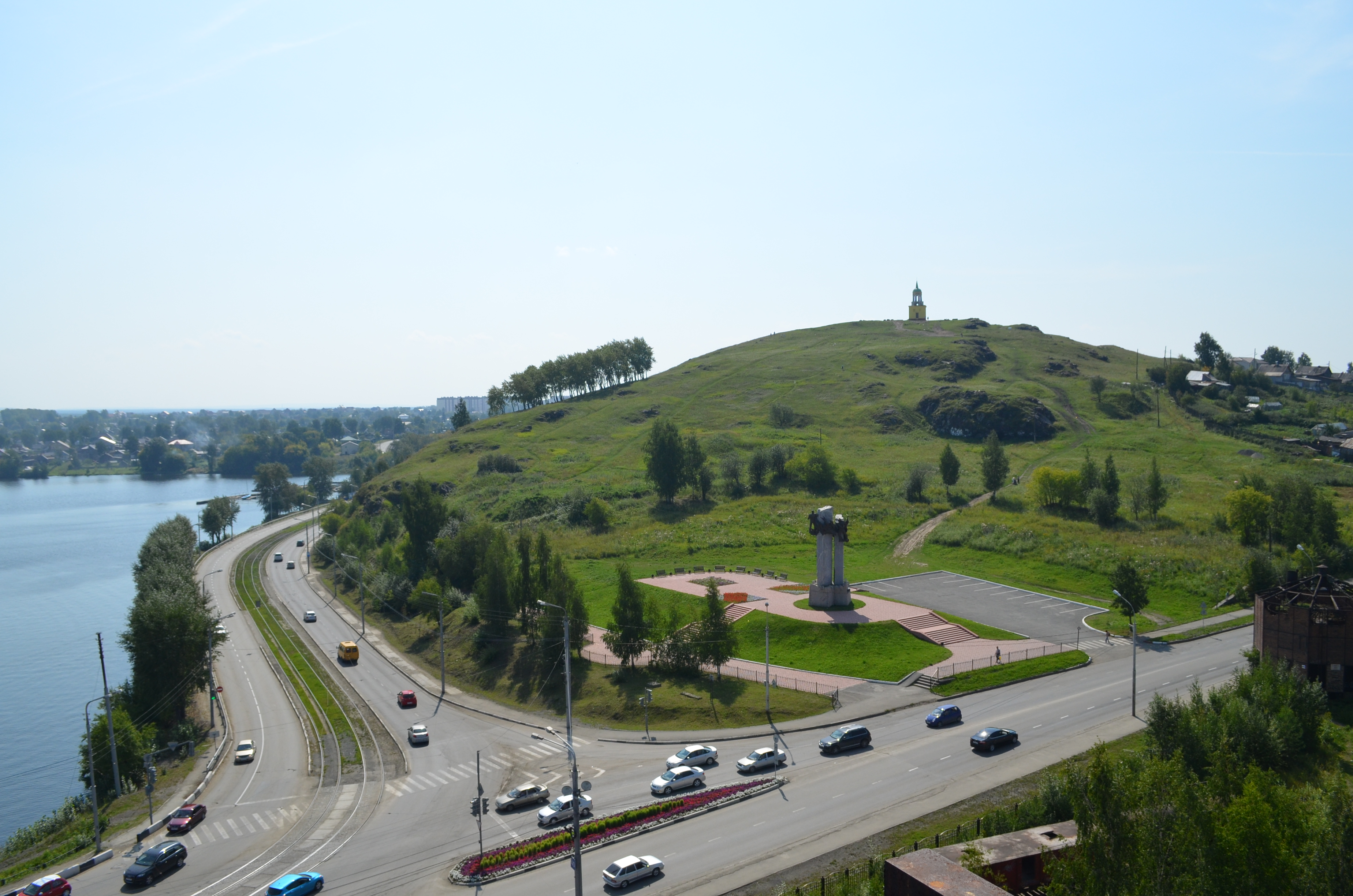 Башня сторожевая (Свердловская область, Нижний Тагил, Лисья гора)